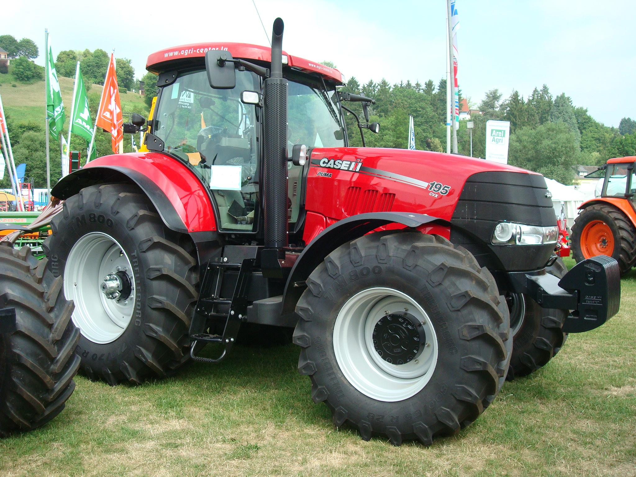 Case-Traktor Puma 195 CVX